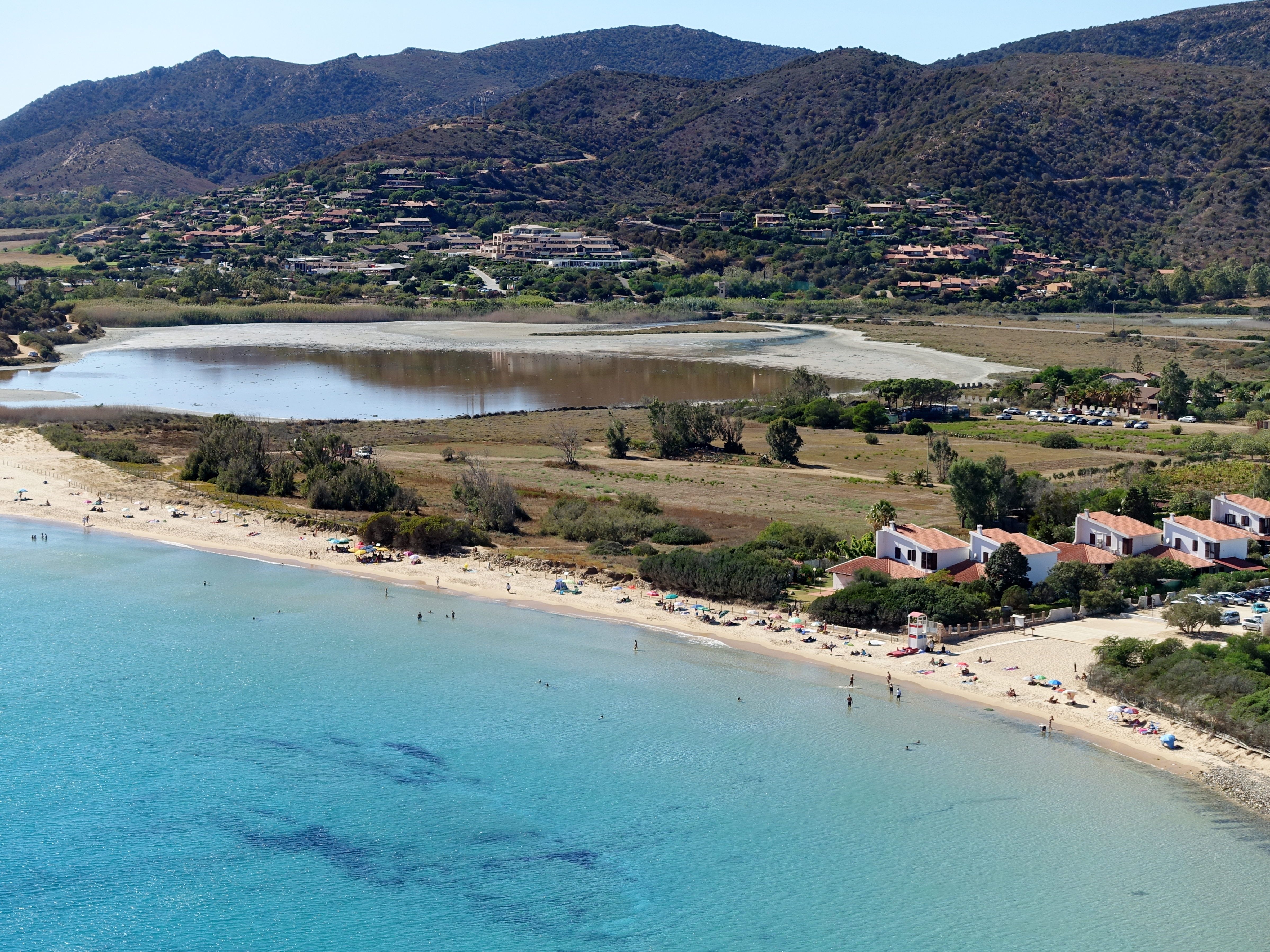 Strand Sa Colonia (Spiaggia della Colonia), Gemeinde Domus de Maria, Sardinien, Italien